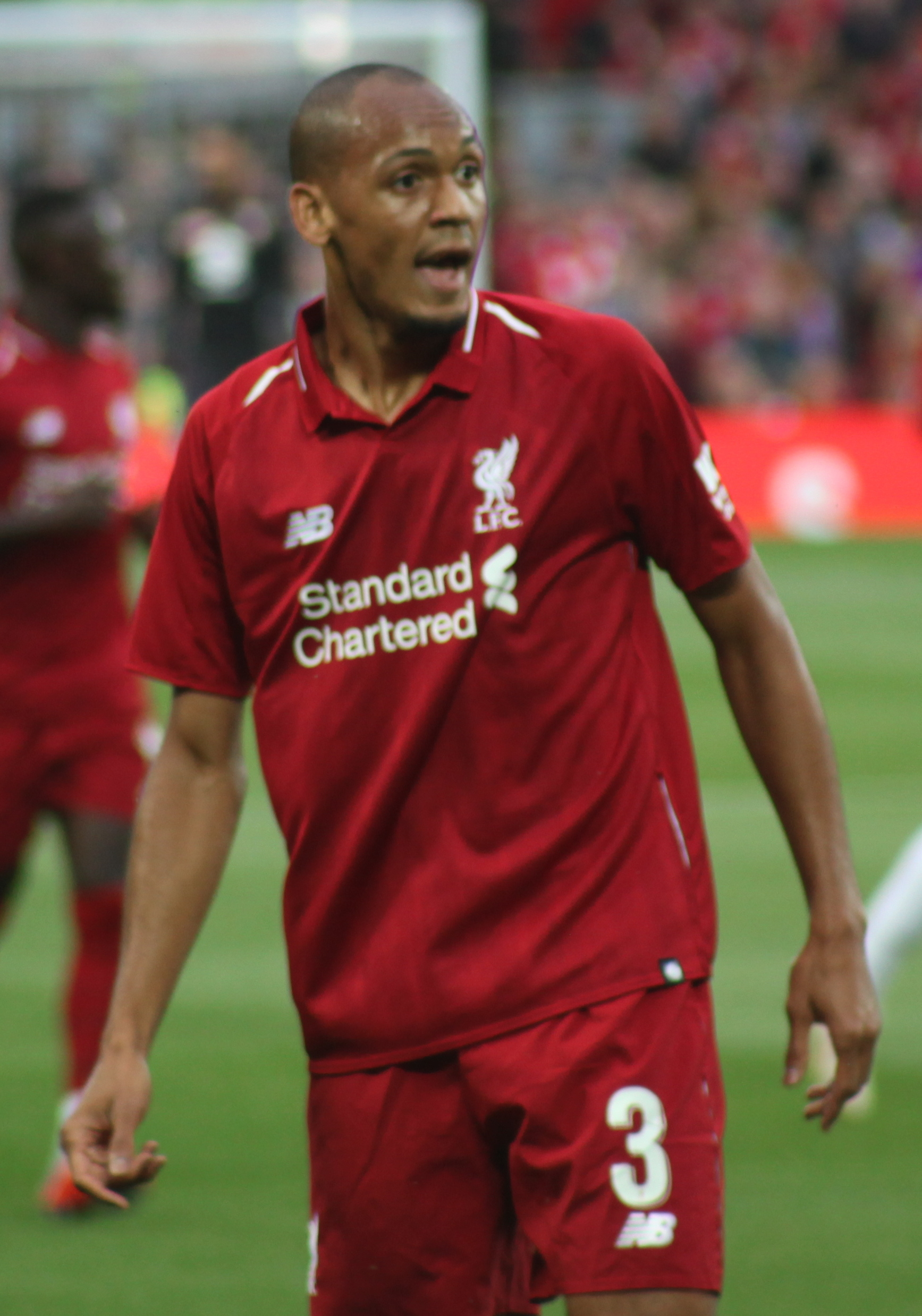 Fabinho